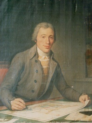 portrait Georges Frerejean (2)